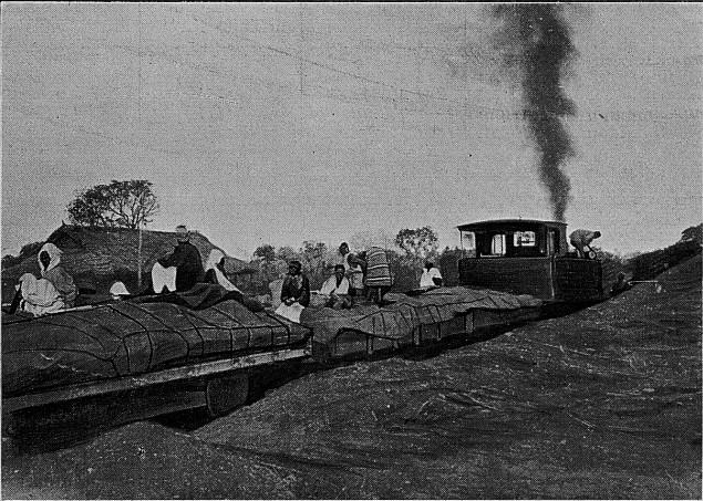 Le chemin de fer de kayes aug Niger. Un train charge de produits